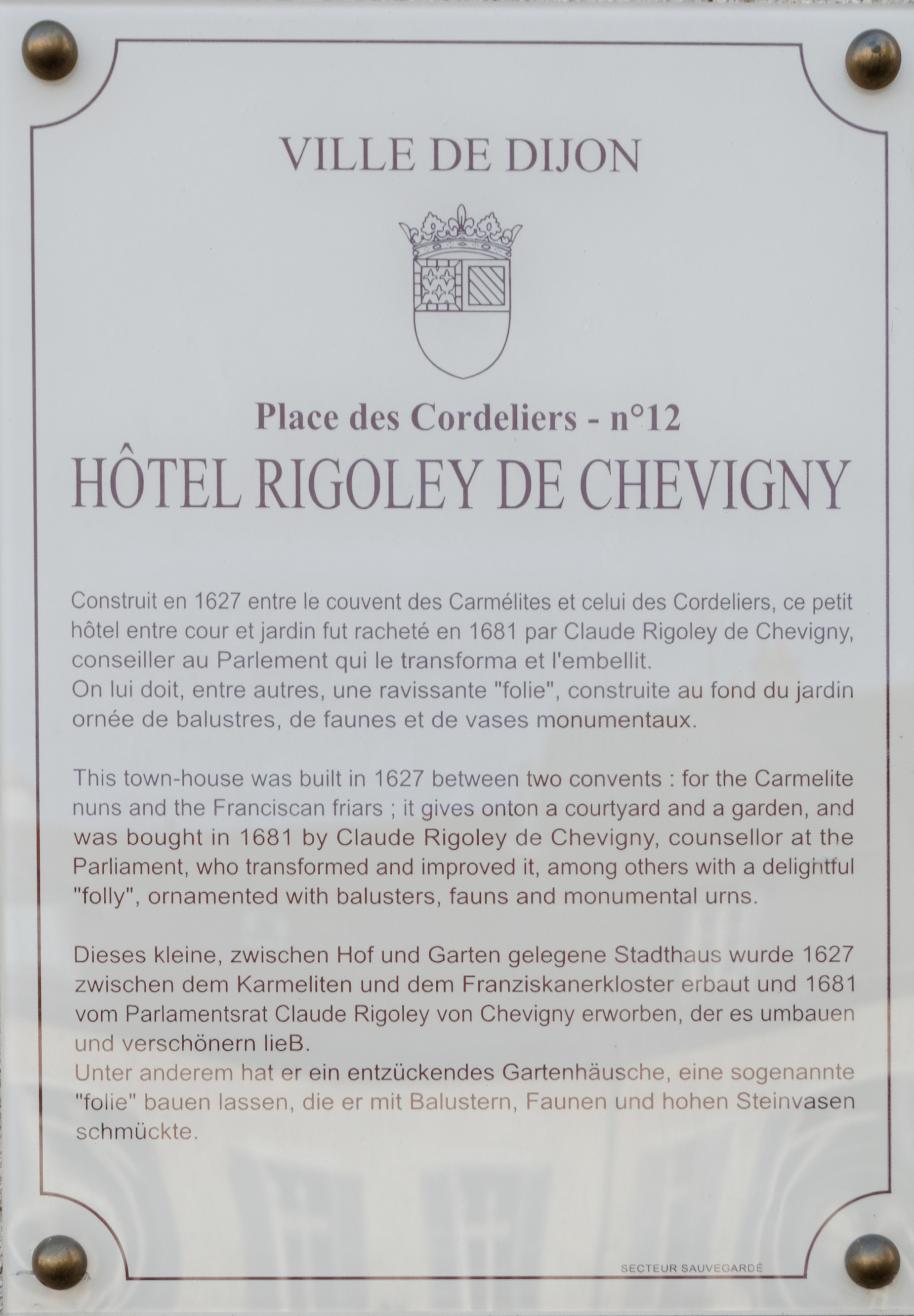 Plaque d'information trilingue (français, anglais et allemand) Hôtel Rigoley de Chevigny, 12 place des Cordeliers, à Dijon (Inscrit, 1928 2001) .